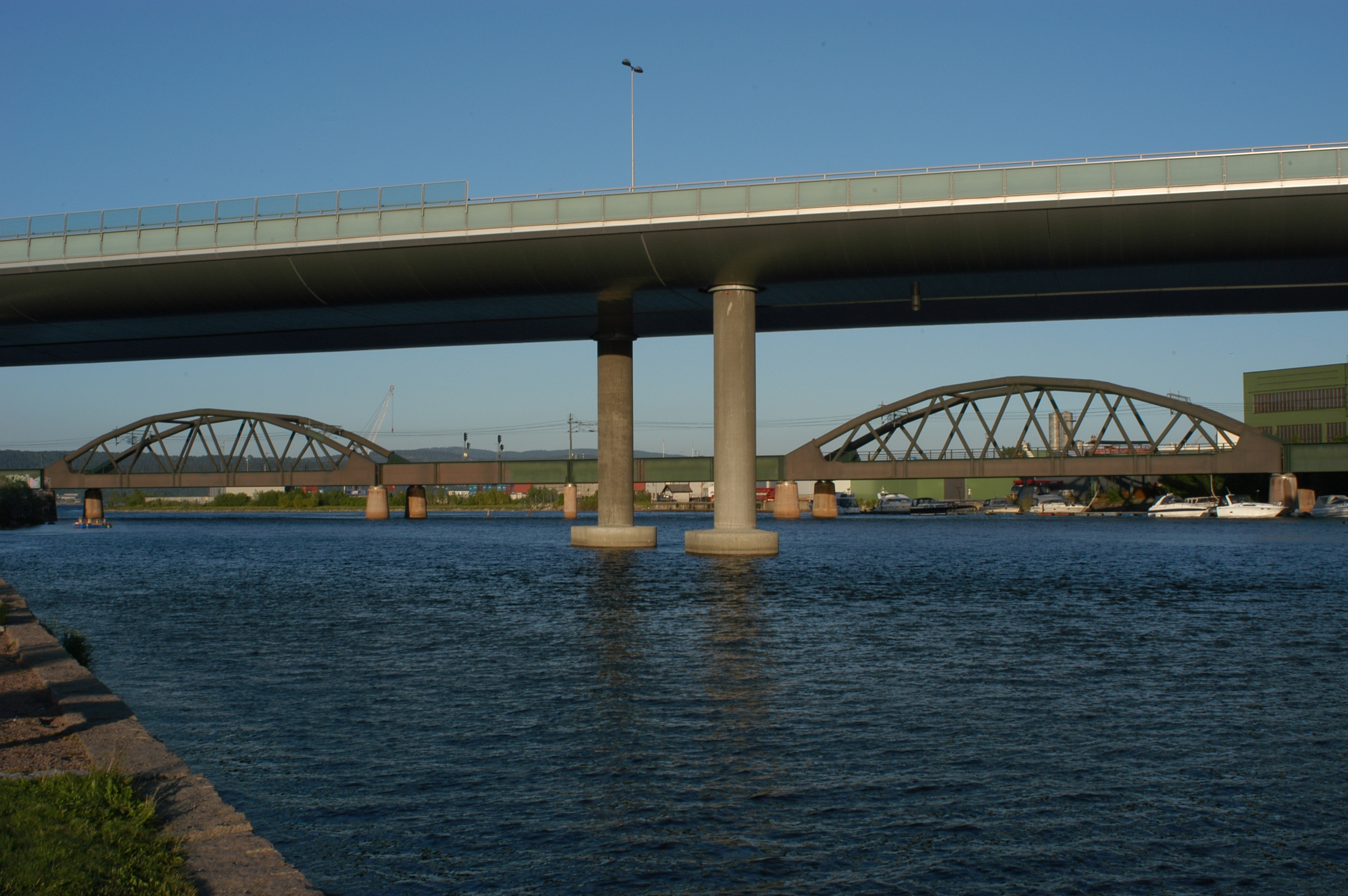 Holmenbrua jernbanebro i Drammen, med veibroa E18 i forgrunnen.